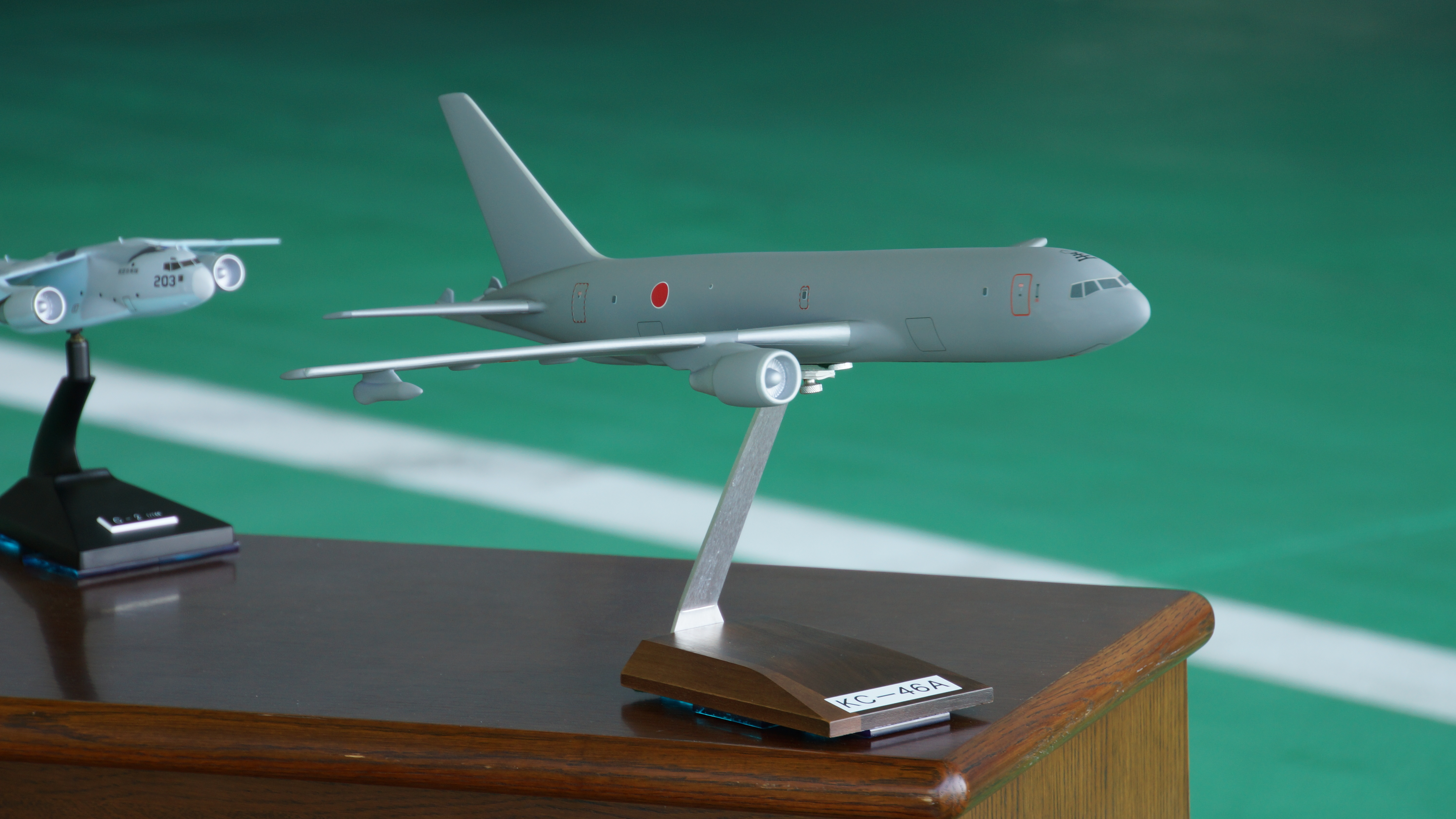 航空自衛隊 KC-46A空中給油・輸送機 模型。2017年5月28日 美保基地にて。